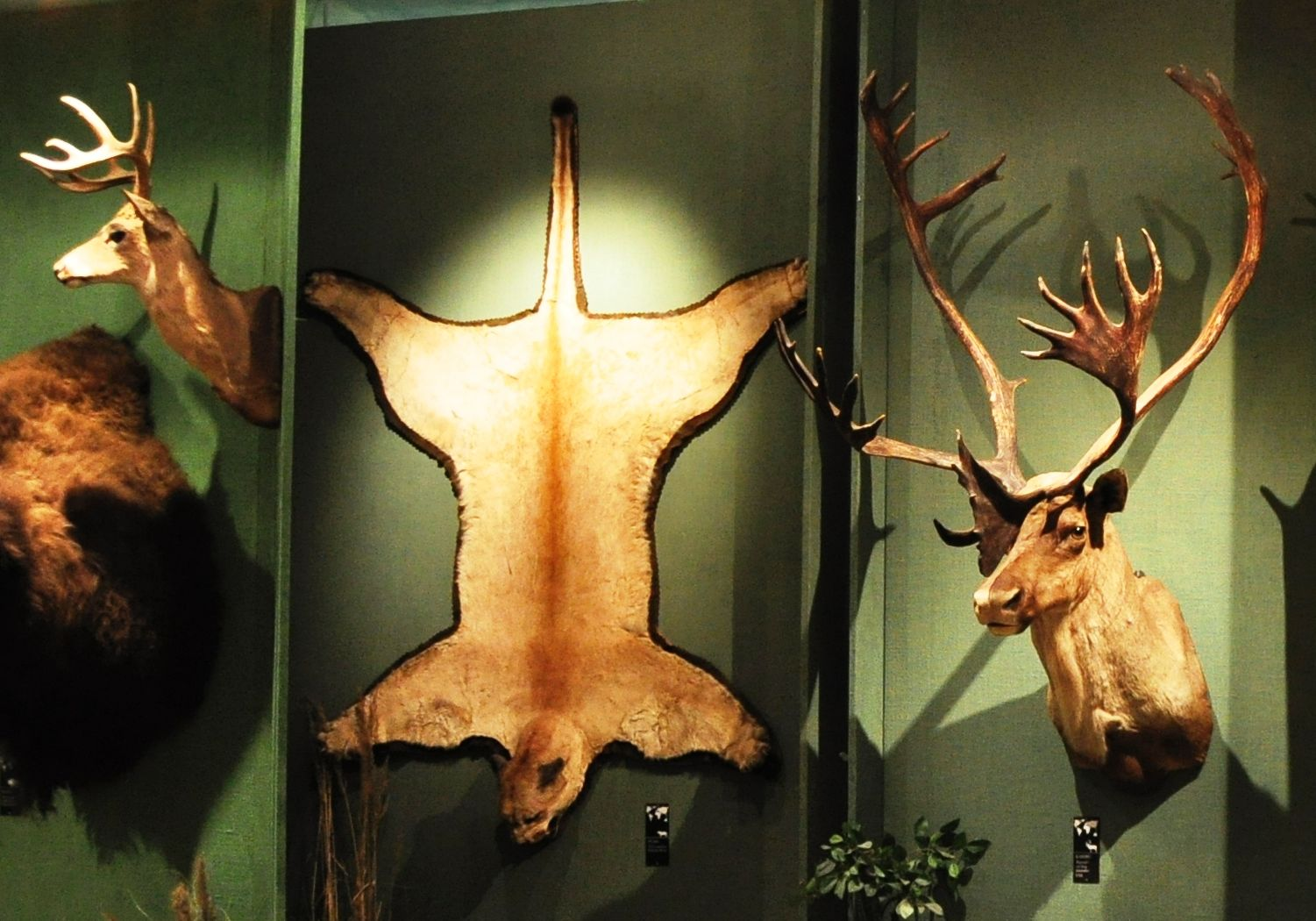 Warschau, Jagd-und Reitmuesum